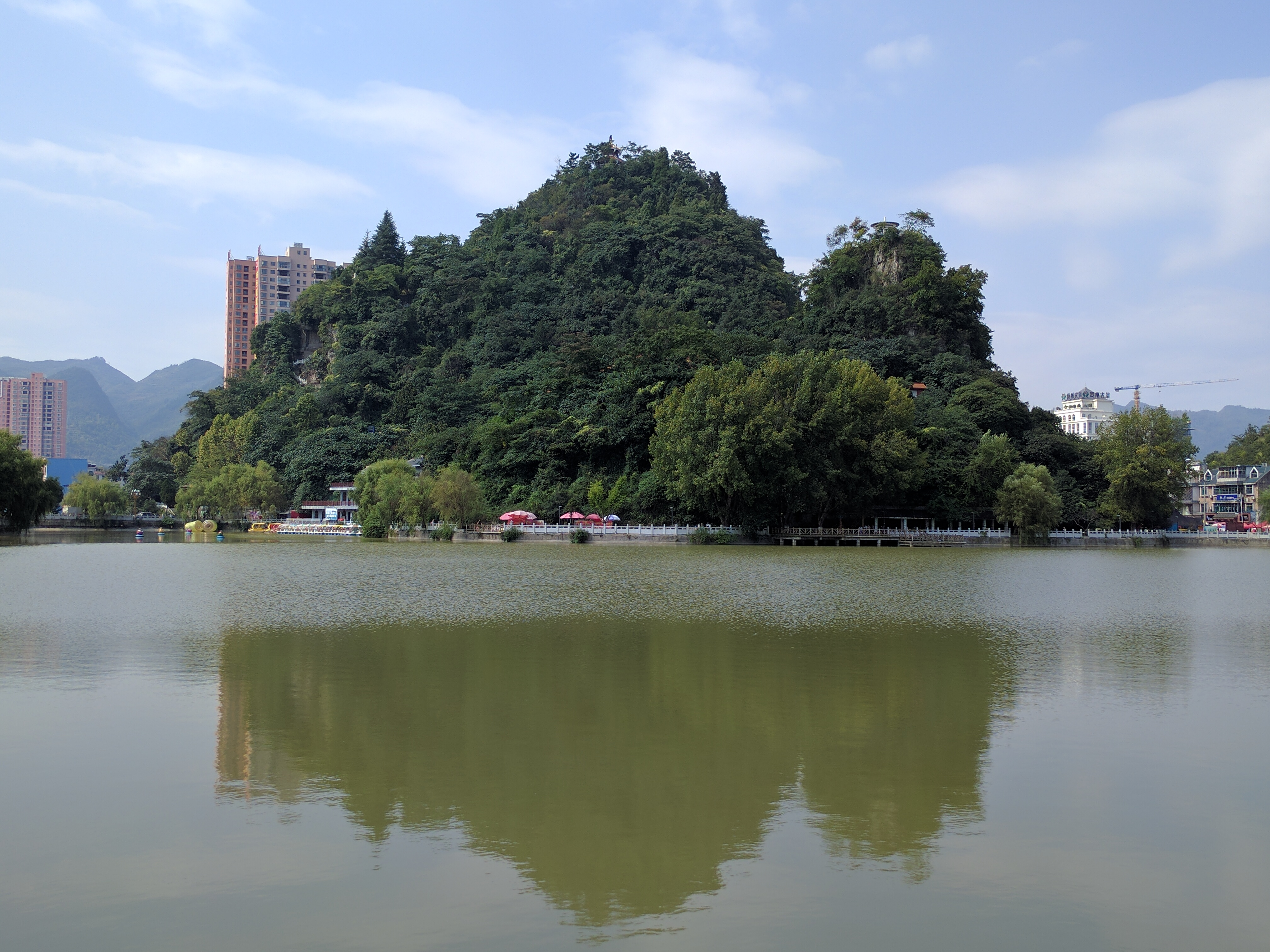 六枝桃花公园